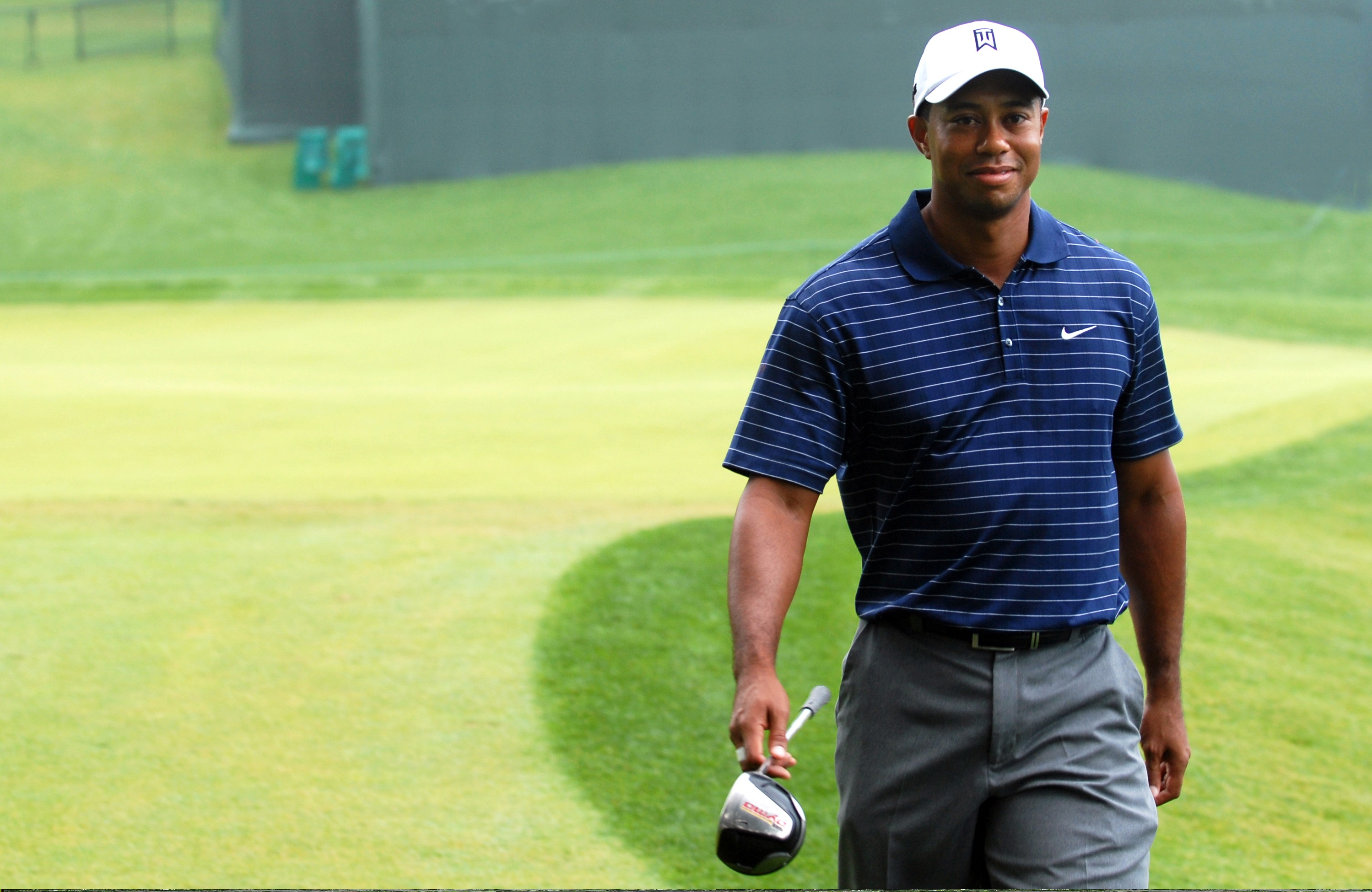 Tiger Woods smiling